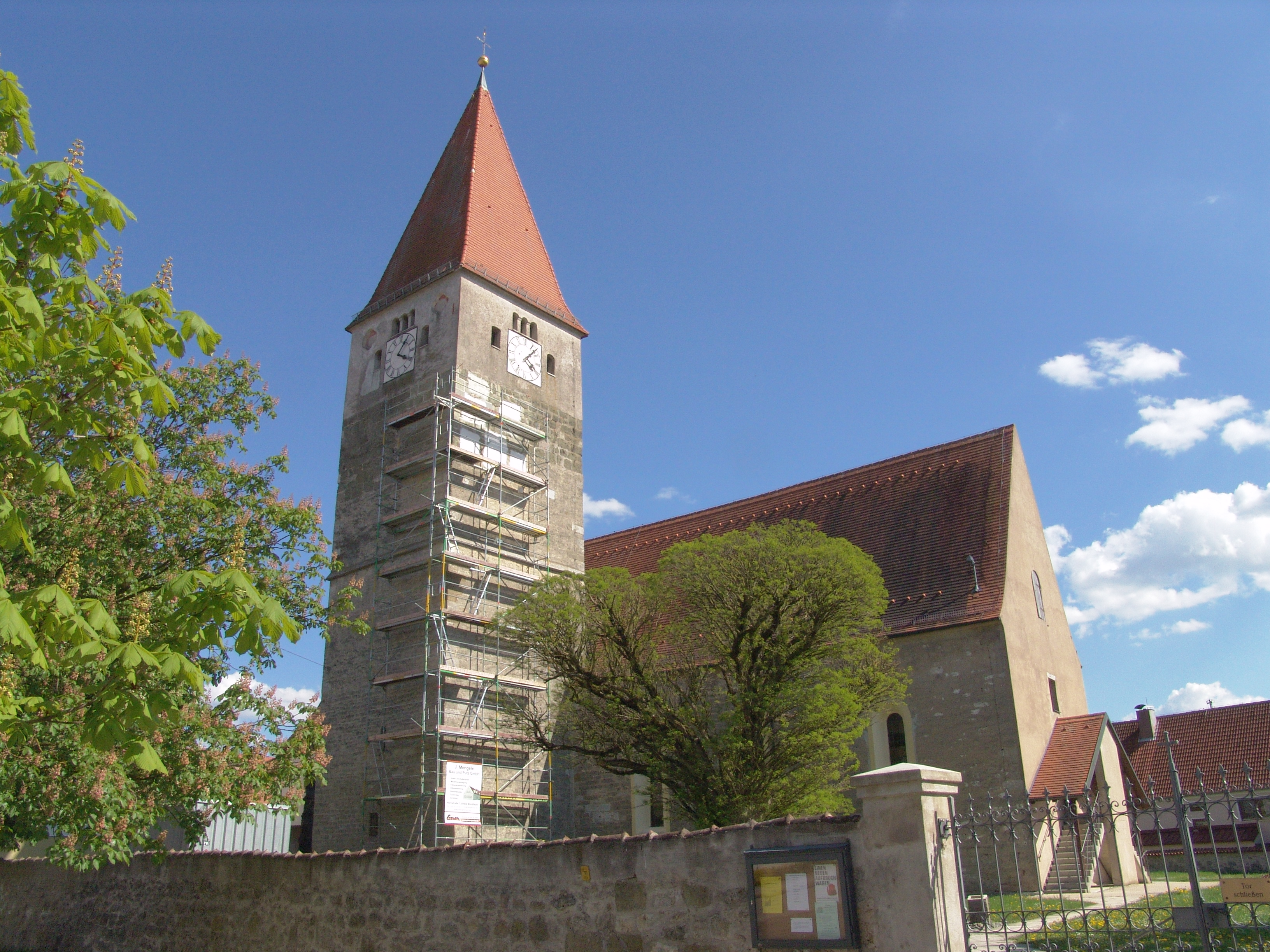 St. Martin in Deiningen, 1616 bis 1961 Simultankirche, seit 1961 wieder kath.